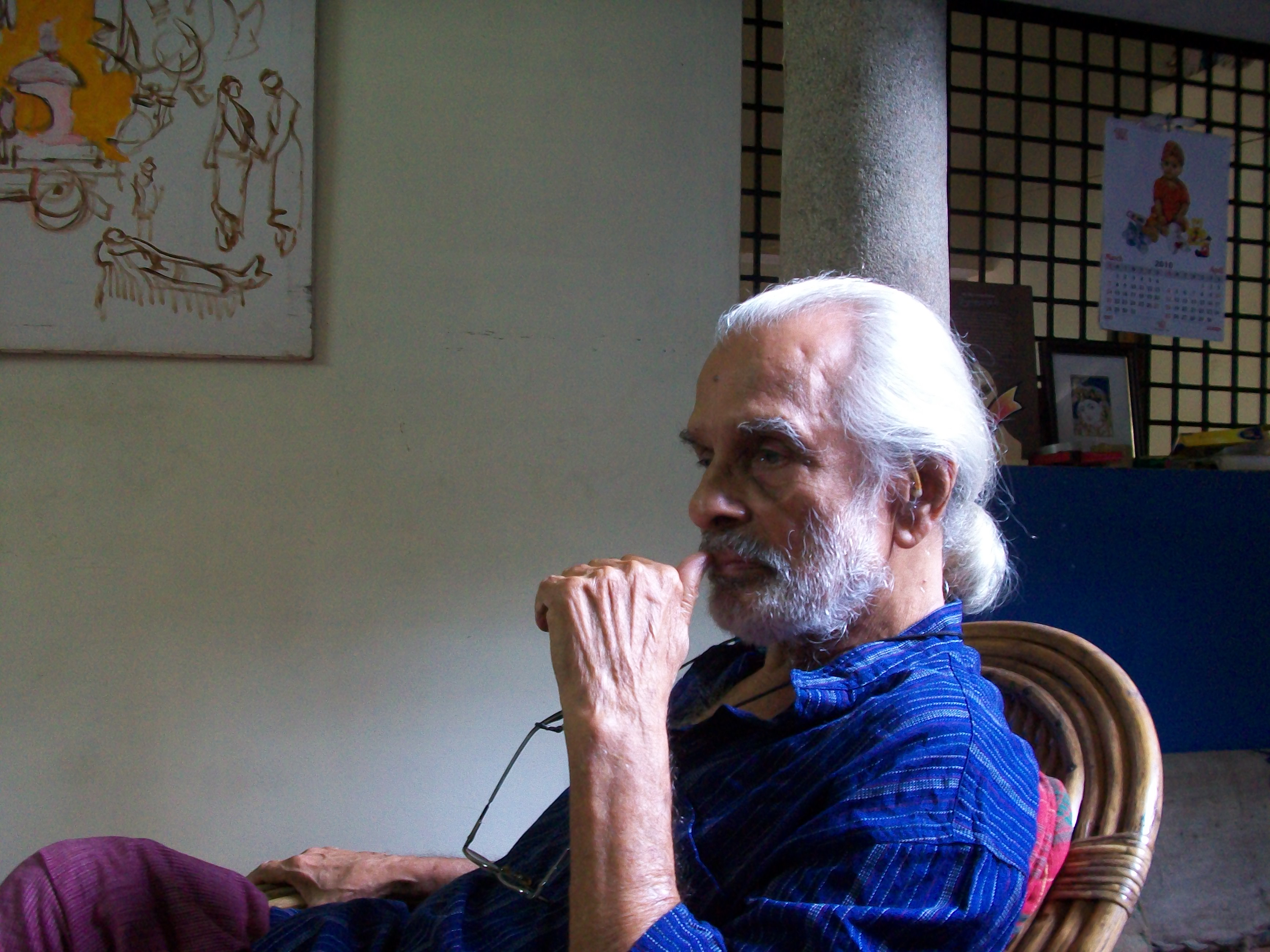 ആർട്ടിസ്റ്റ് നമ്പൂതിരി